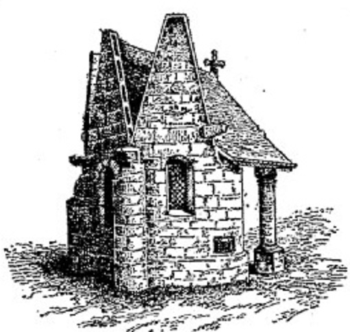 Chapelle dans le cimetière de Plougasnou (dessin publié dans "La grande encyclopédie" de Camille Dreyfus, tome 26.